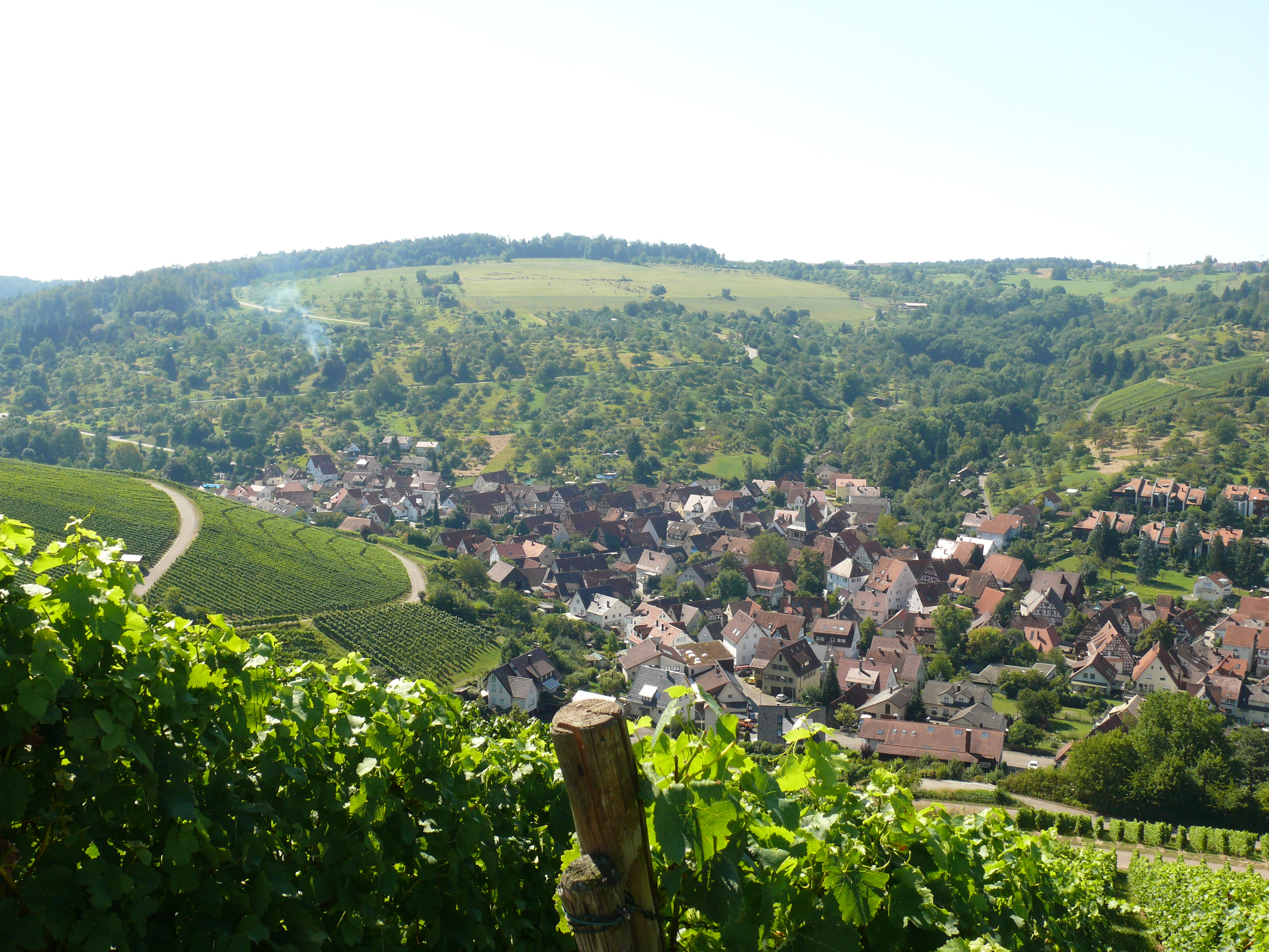 Blick auf Weinstadt-Strümpfelbach von den Weinbergen aus östlicher Richtung.